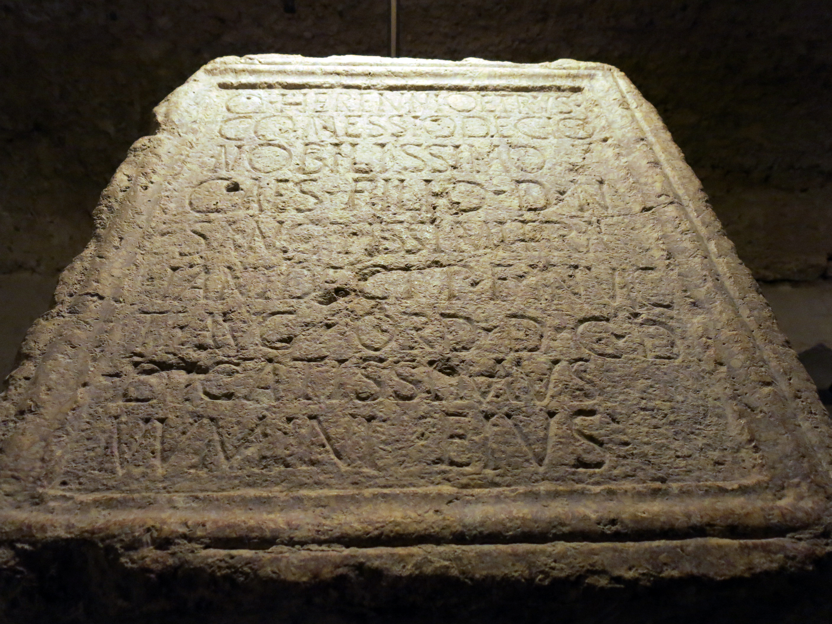 Catedral de Santa Maria (Tortosa)